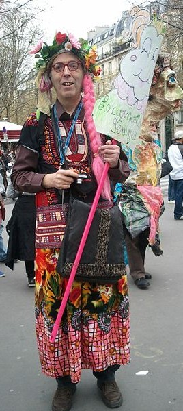 Avant le départ du cortège, l'enseigne de tête.